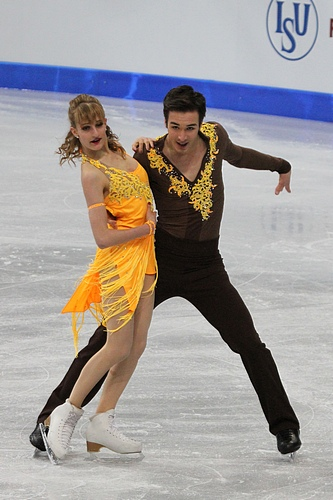 Габриэла Пападакис и Гийом Сизерон (Франция) на чемпионате мира по фигурному катанию среди юниоров 2012